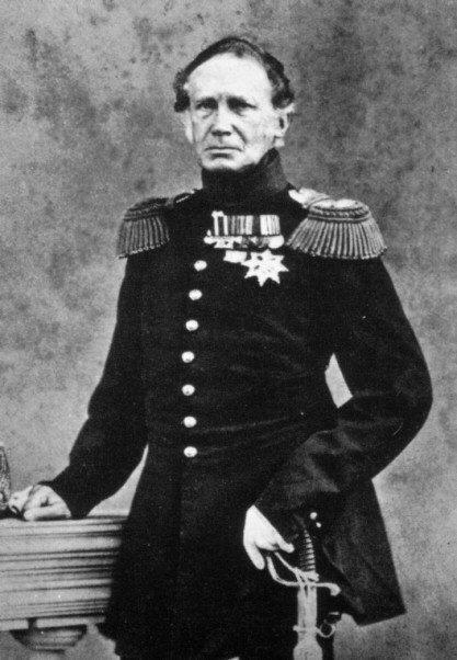 Foto van prins Frederik (overleden 1881). Foto gemaakt omstreeks 1865, eventueel berustend auteursrecht verlopen. Afbeelding komt in meerdere publicaties voor. Deze versie gevonden op alwaar het zonder auteursrechten gekopieerd mag worden.